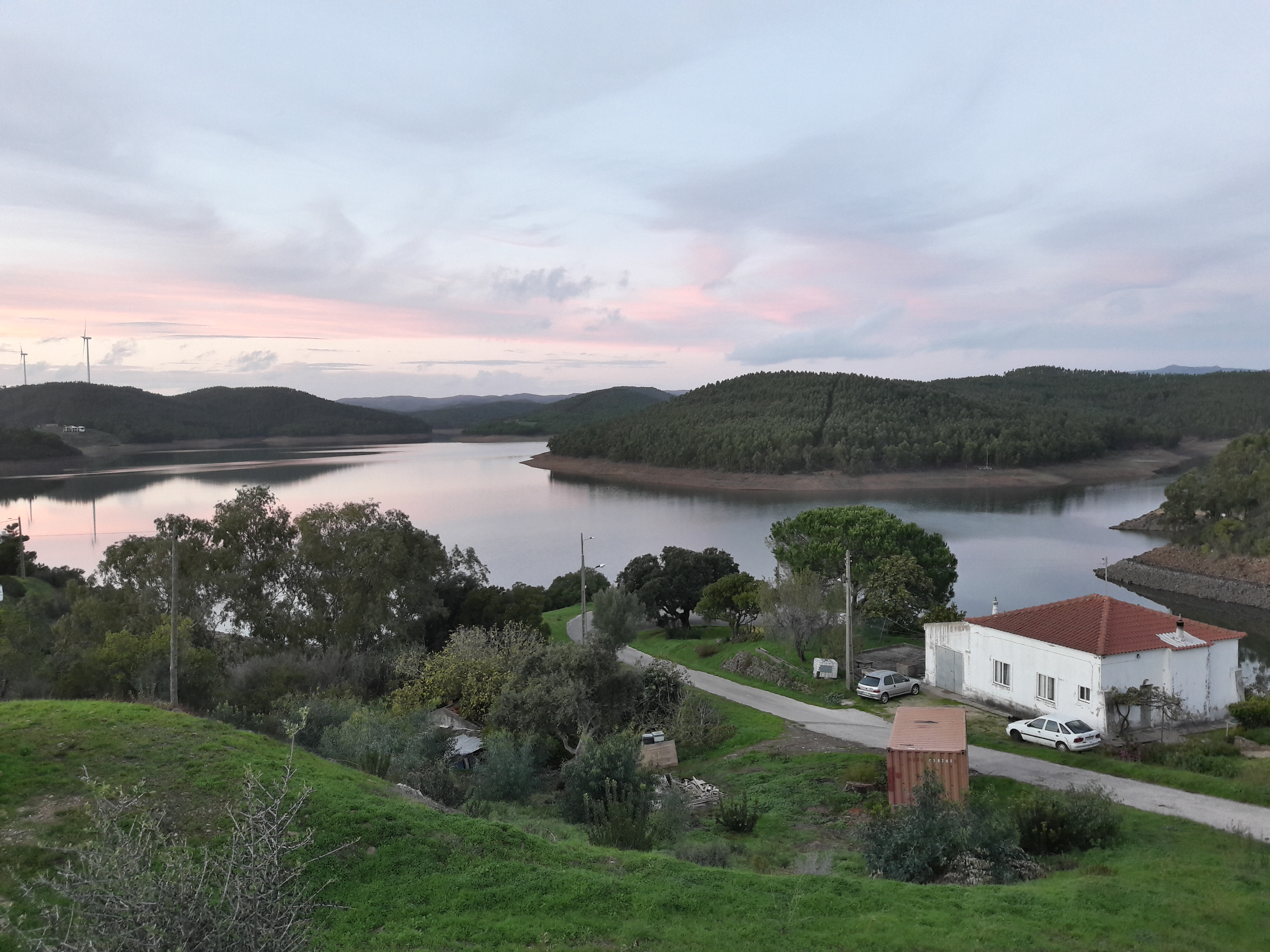 Barragem da Bravura, Lagos - Algarve. Foto tirada a 21/11/2018